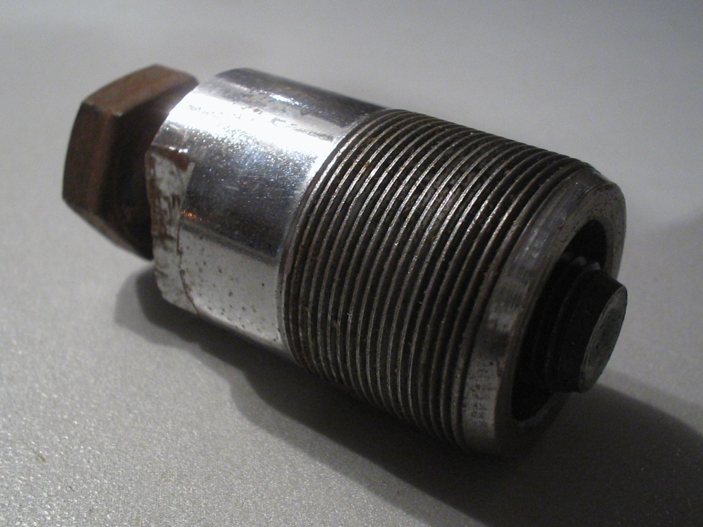 poelietrekker voor vliegwiel bromfiets